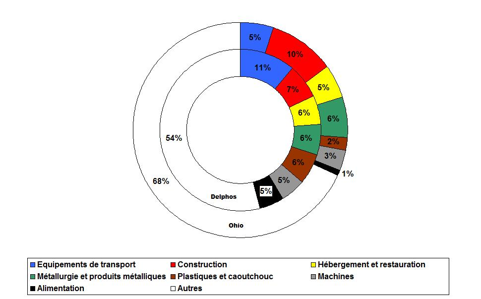 Principaux secteurs d'emploi de la population masculine de Delphos (Ohio - Etats-Unis), en 2009